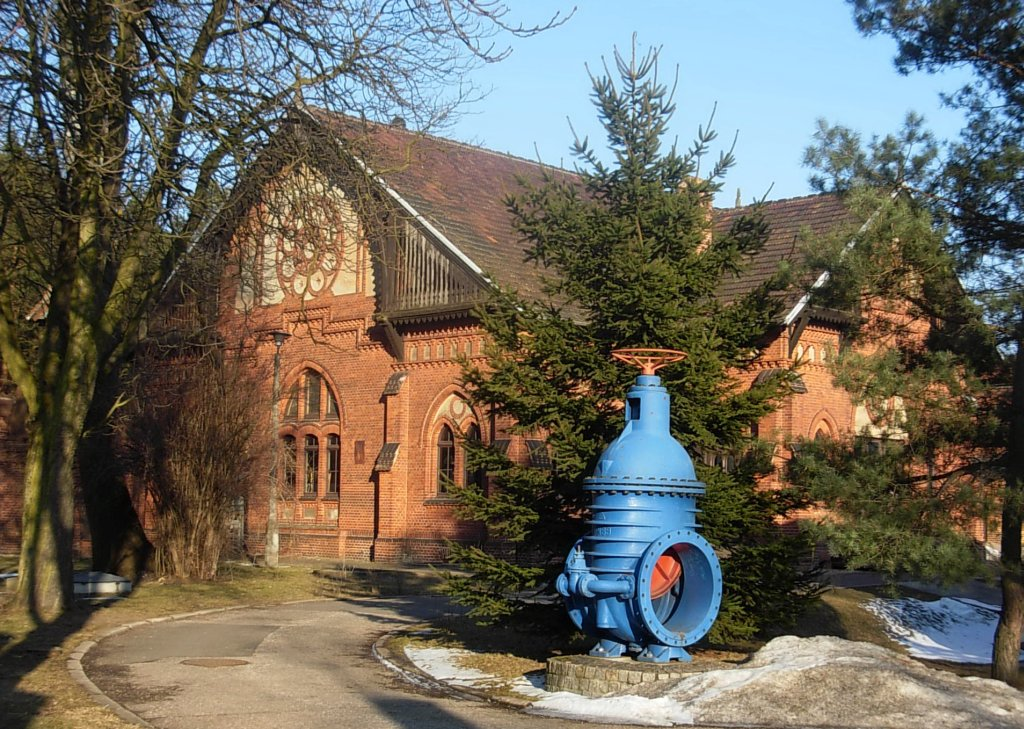 Przepompownia wodociągów miejskich z 1900 r. w kompleksie przy ul. Gdańskiej 242 w Bydgoszczy